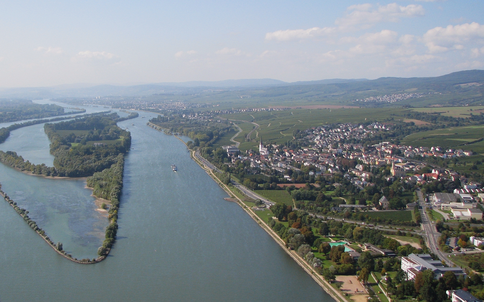 Luftbild Erbach mit der größten Rheininsel Mariannenaue Rheingau-Taunus-Kreis Hessen Rhein Naturschutzreservat Schloss Reinhartshausen Foto 2008 Wolfgang Pehlemann Wiesbaden